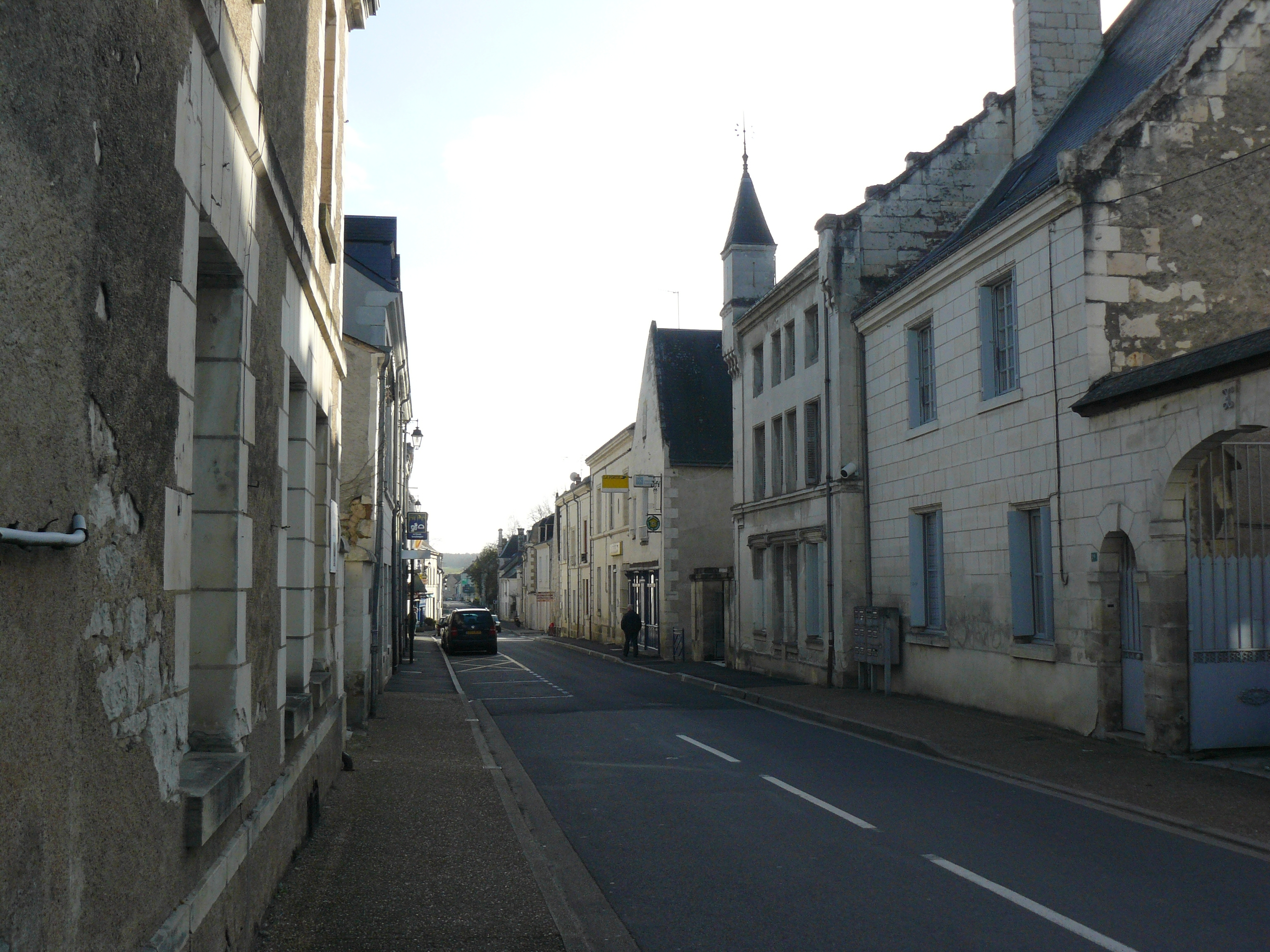 La Grande Rue de Saint-Epain